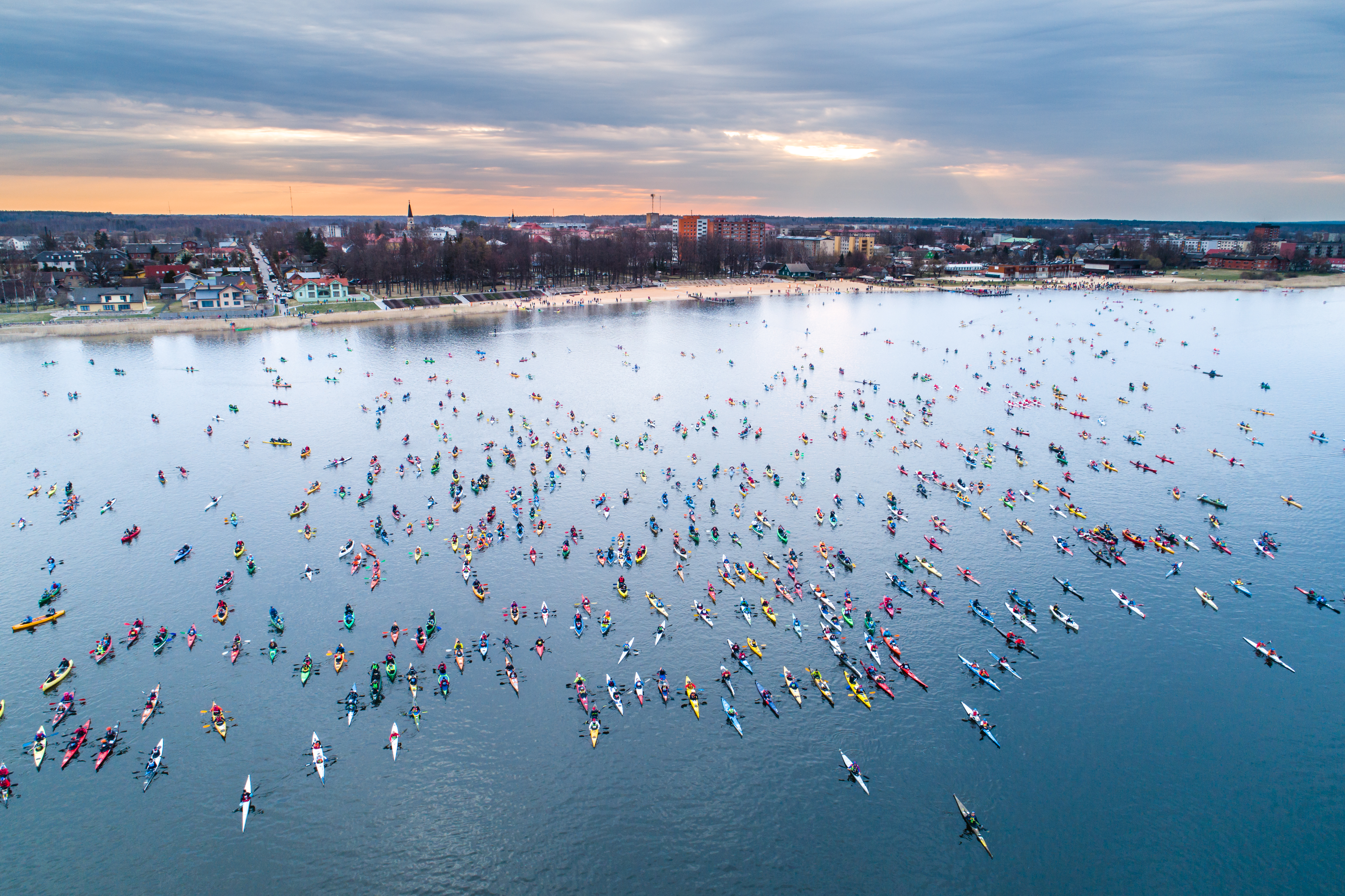 14. Võhandu maratoni start 2019 aastal Tamula järvelt. Startis 1074 paatkonda.